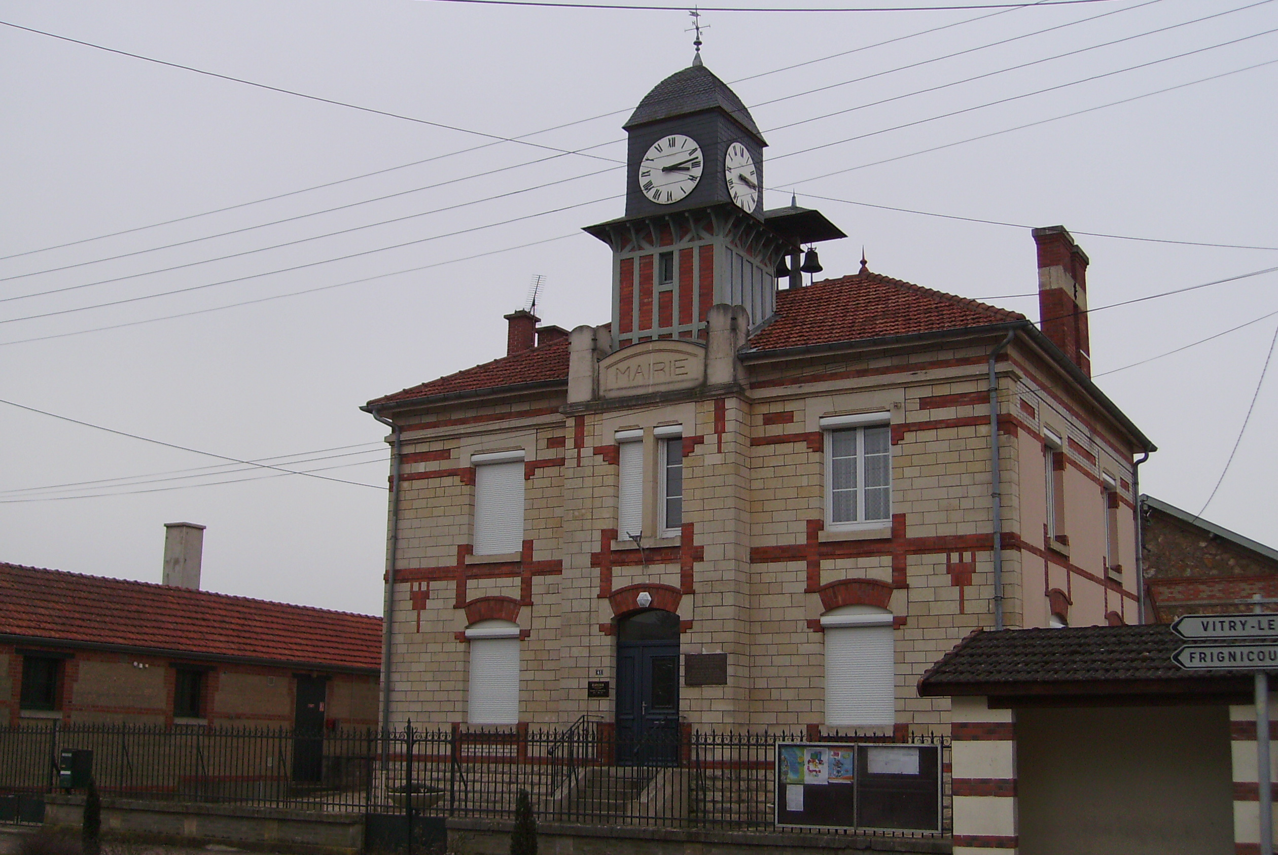 Mairie de Courdemanges